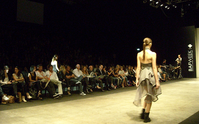 Desfile de Cora Groppo en BAFWeek